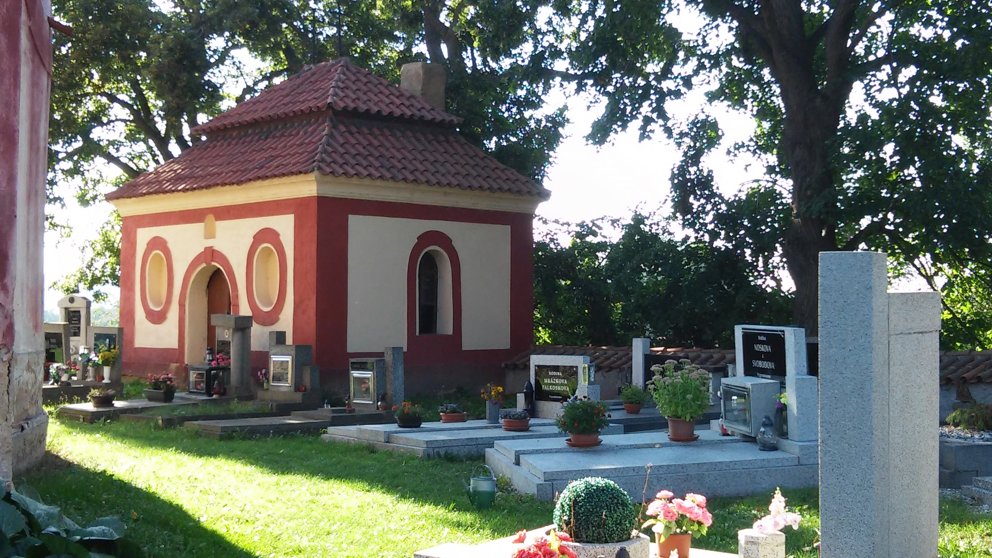 Krupá